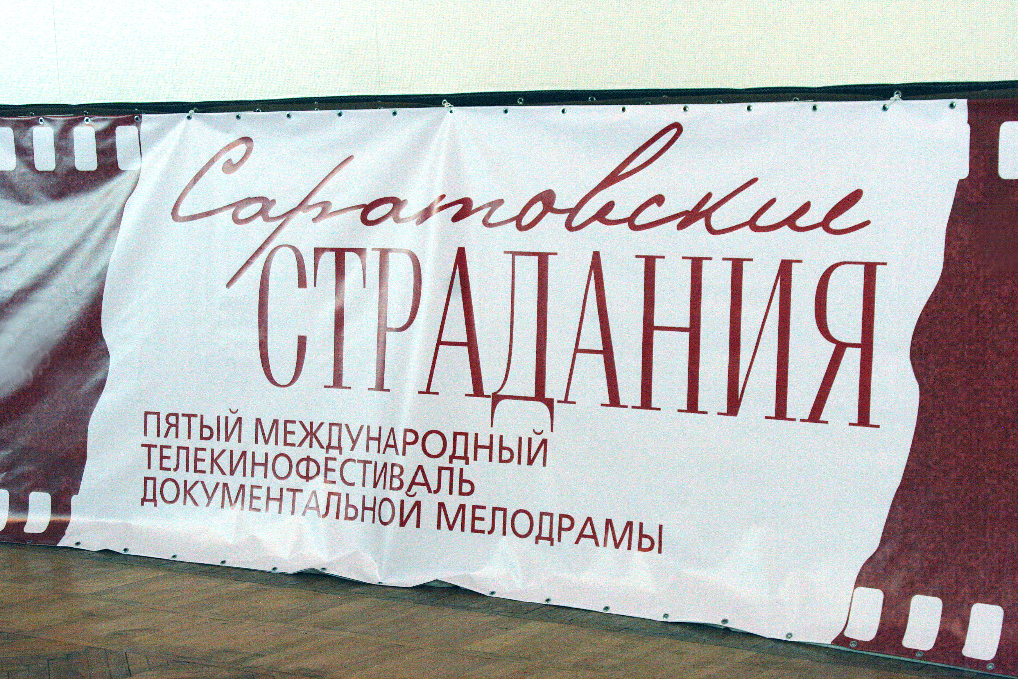 Баннер пятых "Саратовских страданий"